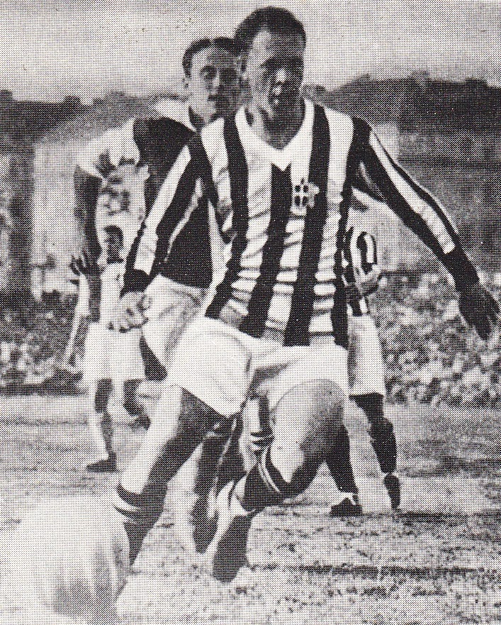 Il calciatore italiano Virginio Rosetta in azione alla Juventus nella prima metà degli anni 30 del XX secolo.